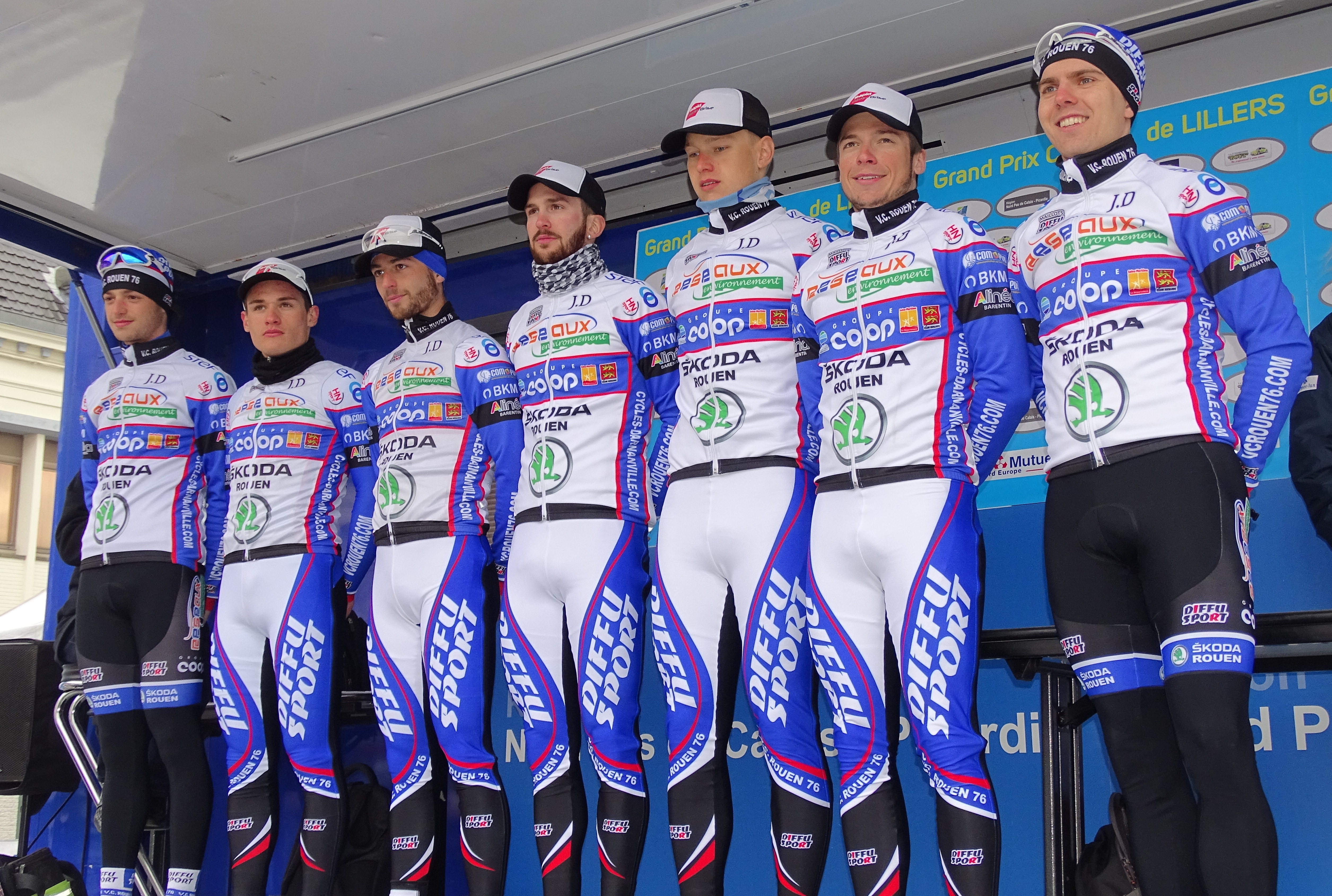 Reportage réalisé le dimanche 6 mars à l'occasion du départ et de l'arrivée du Grand Prix de Lillers-Souvenir Bruno Comini 2016 à Lillers, Pas-de-Calais, Nord-Pas-de-Calais, France.